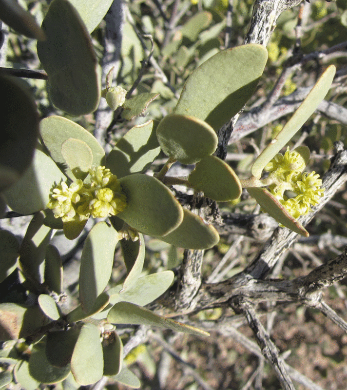 simmondsia chinensis